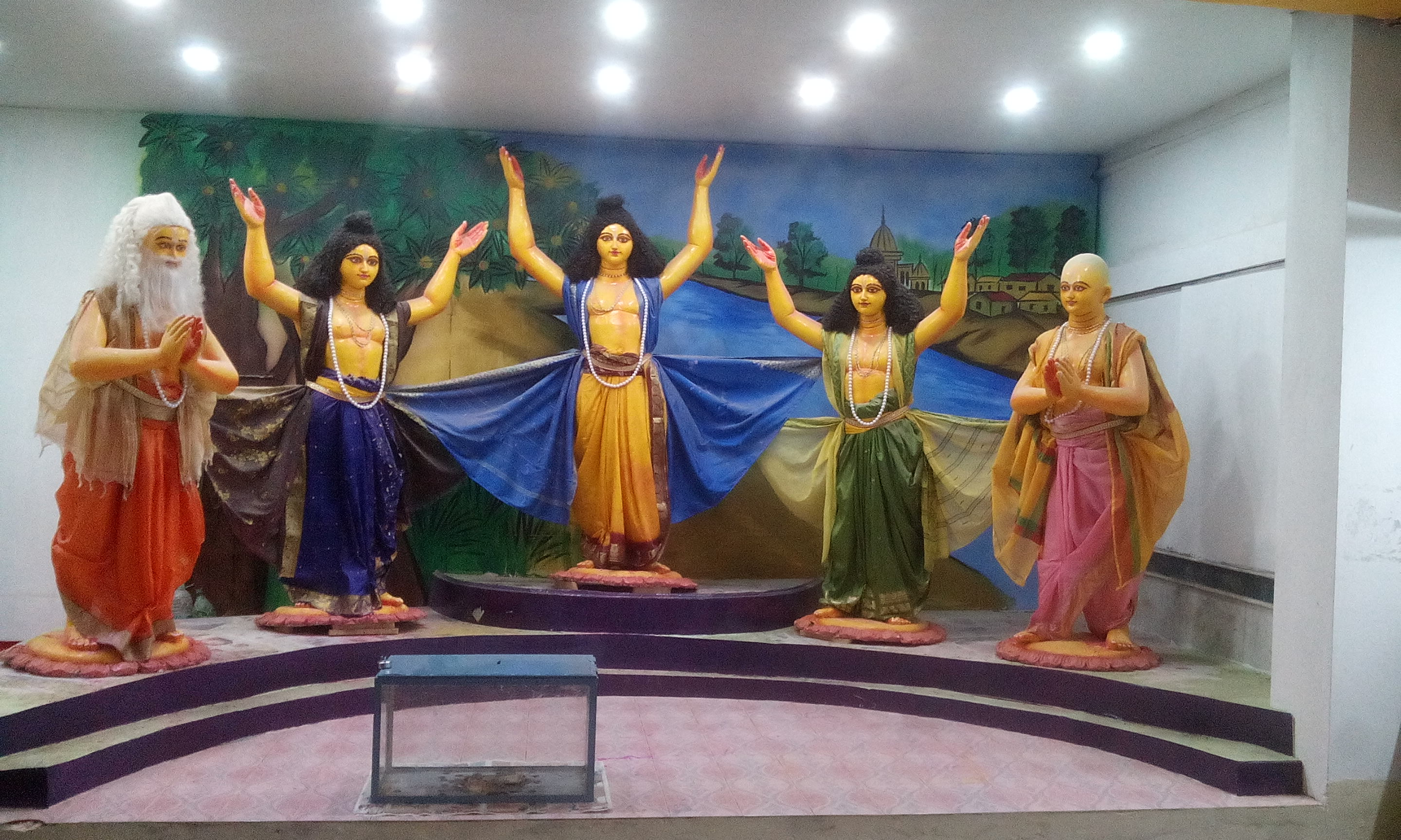 নবদ্বীপের প্রাচীন মায়াপুরে নরহরি ধাম আশ্রমে পঞ্চতত্ব-এর মূর্তি